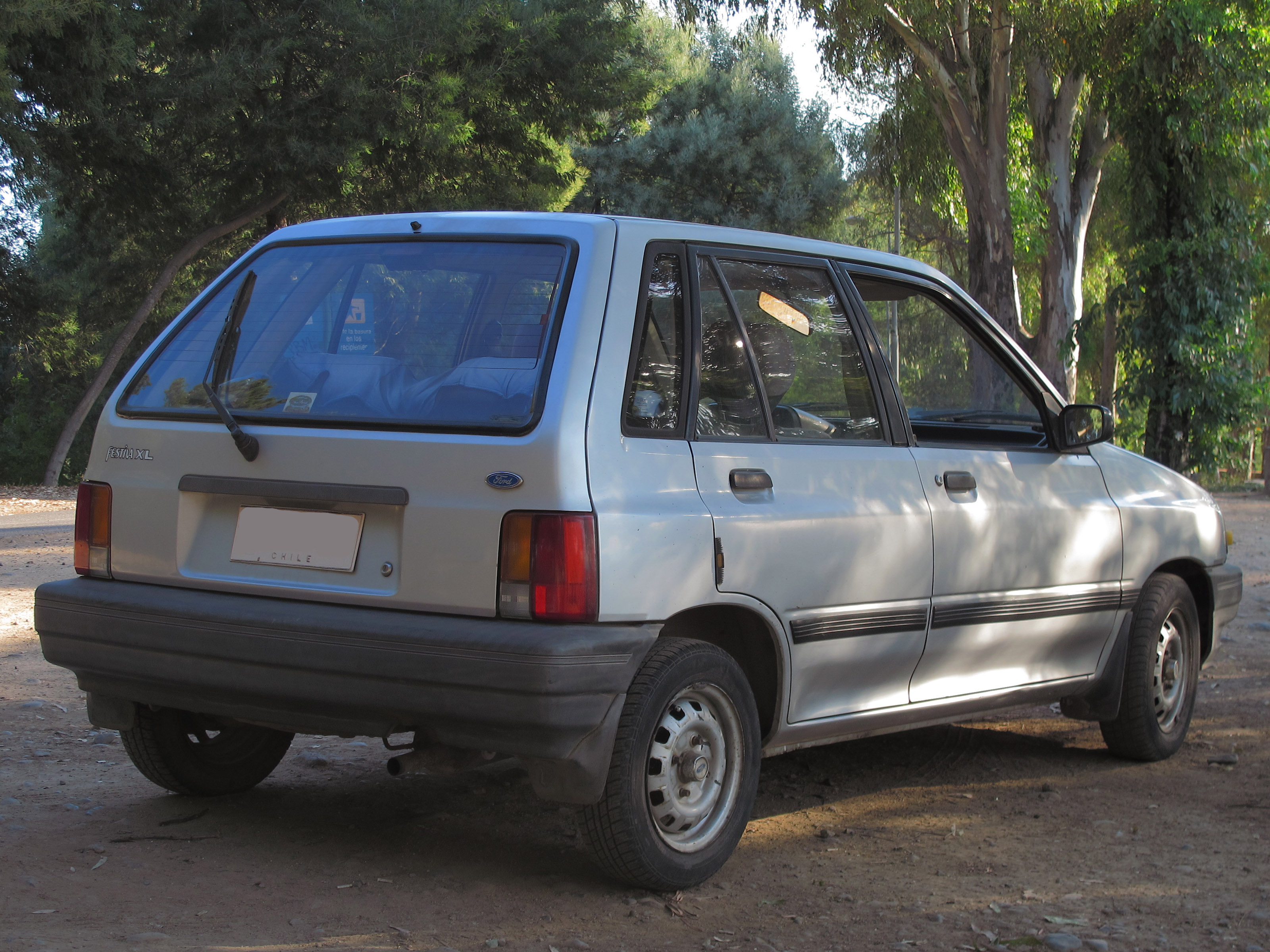 Also called Saipa Nasim, Mazda 121, Kia Pride